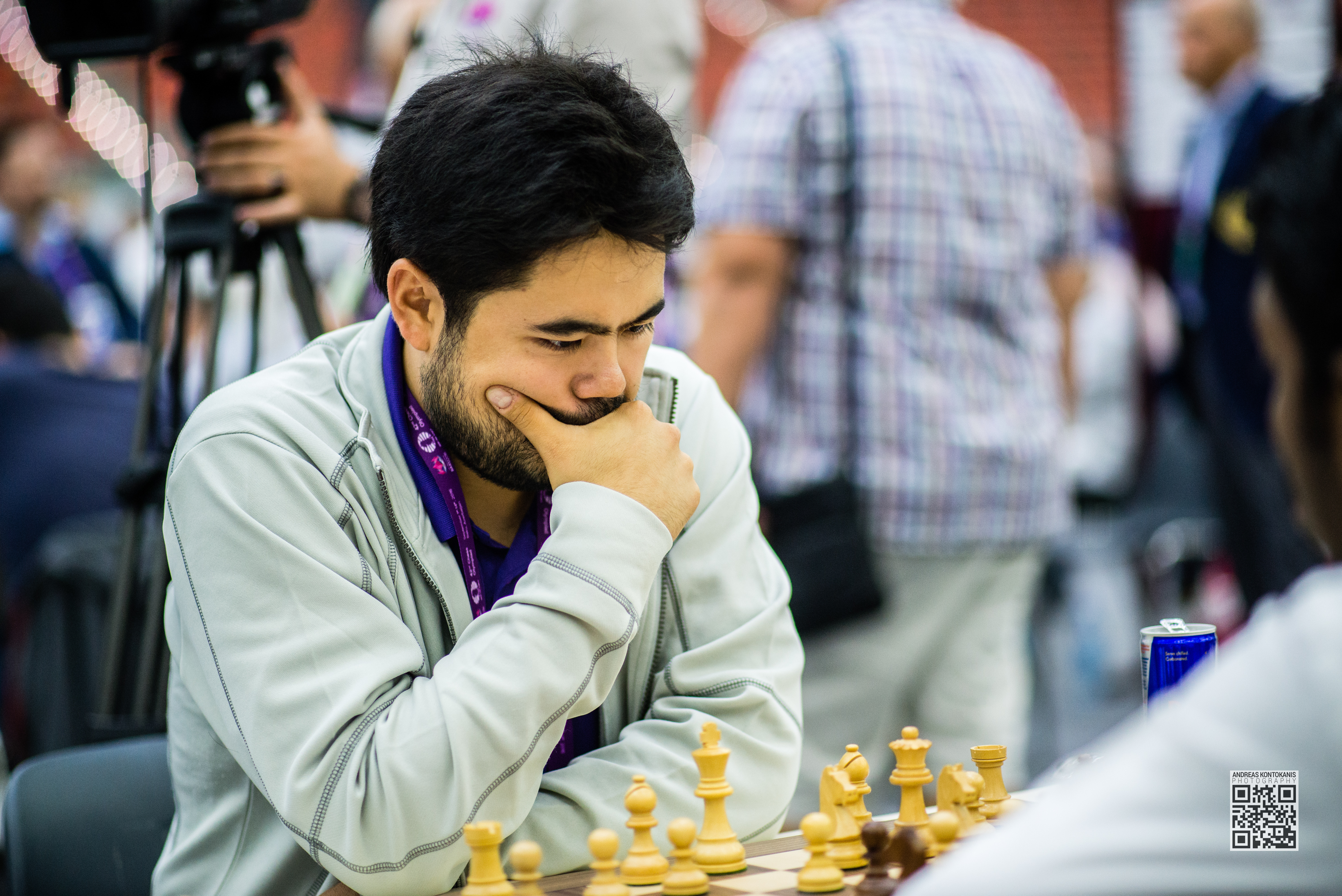 Nakamura Hikaru